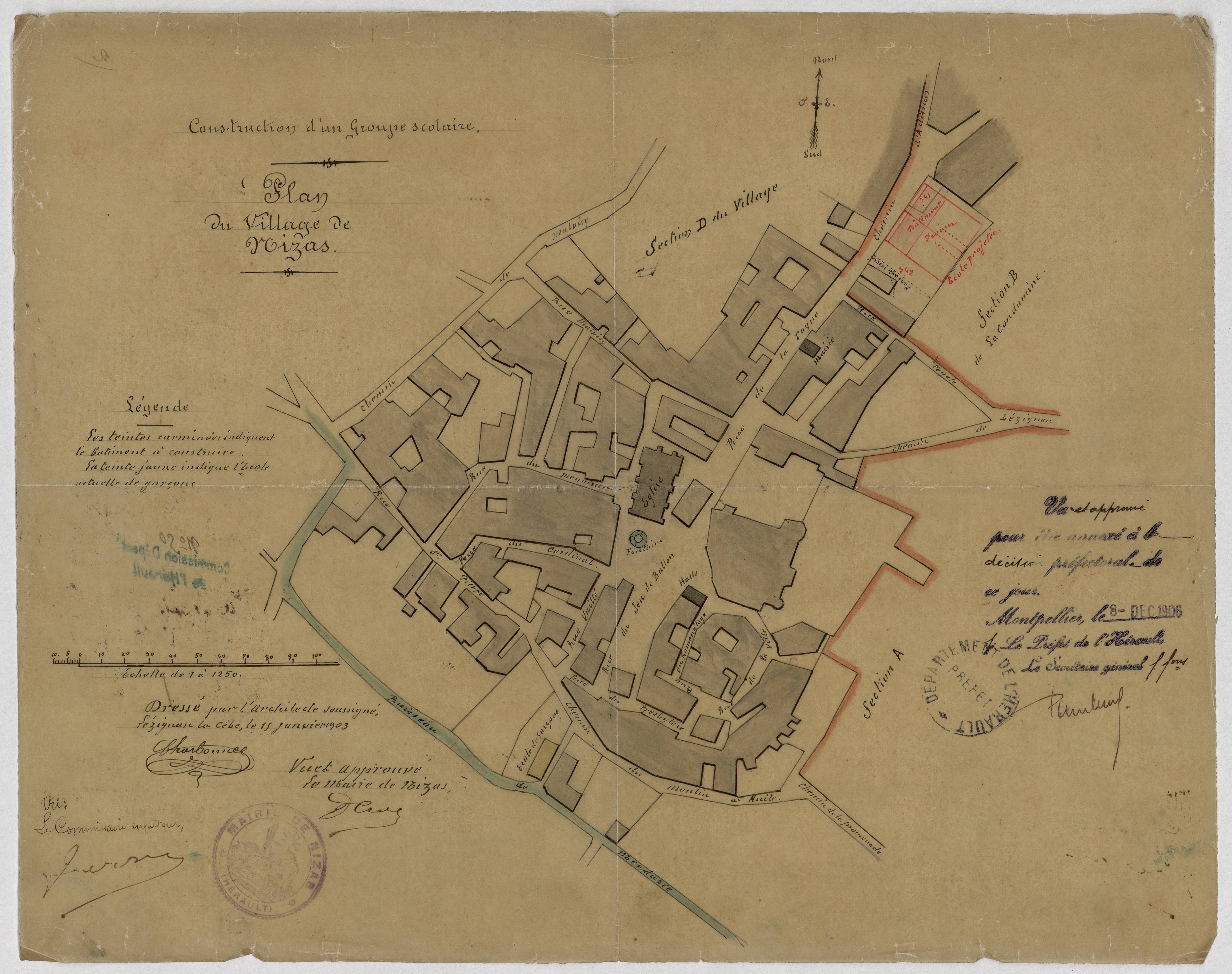 Nizas. - Construction d'un groupe scolaire : plan du village